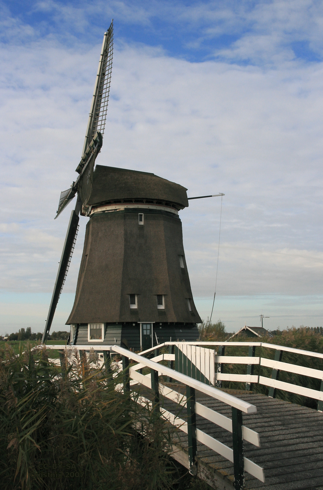 Heerhugowaard: Molen Veenhuizer